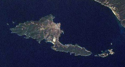 Insula Ammoulianí vazuta din spatiu.